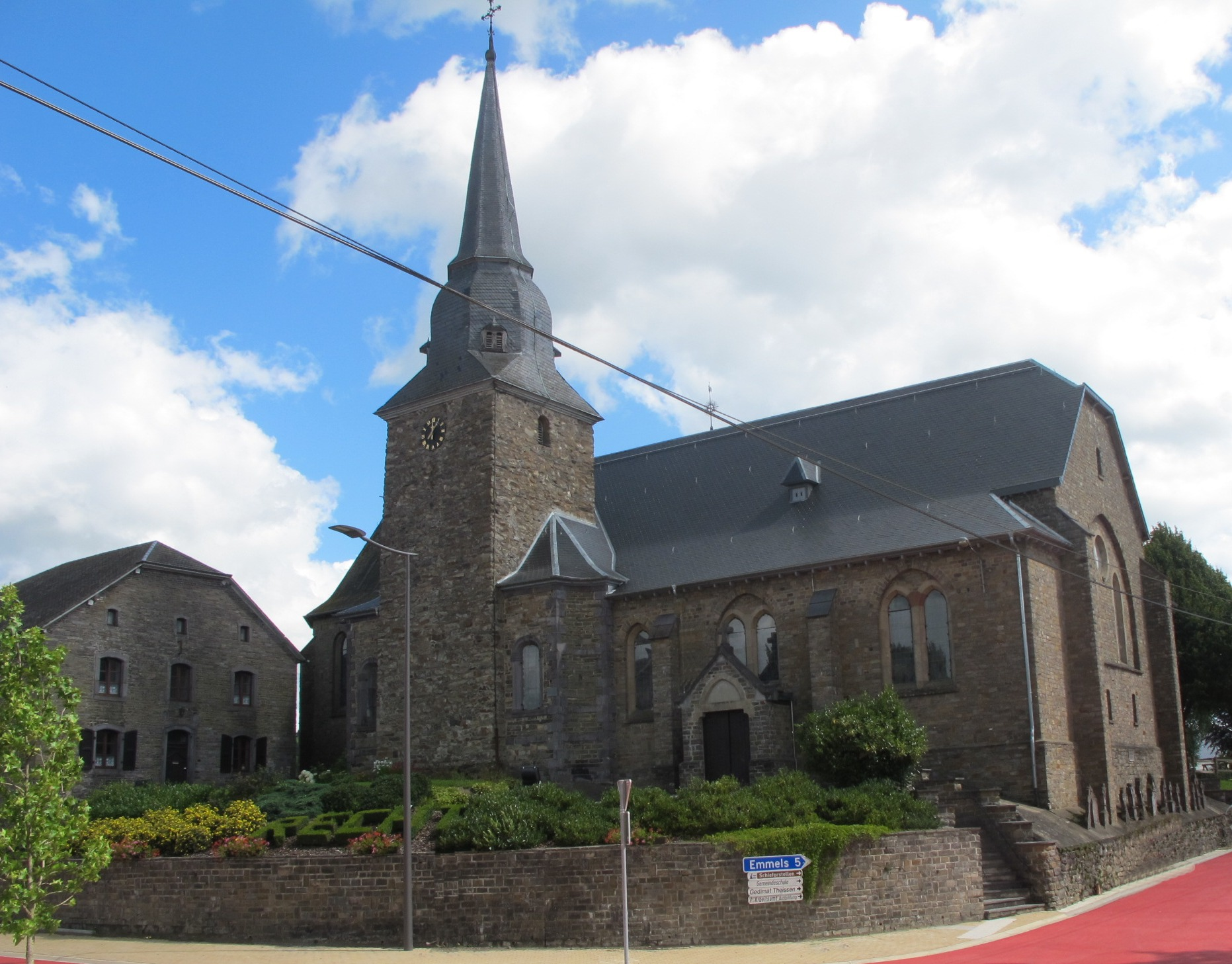 Kirche St. Adelgundis (von Maubeuge) in Recht, Sankt-Vith, Belgien, (1753)